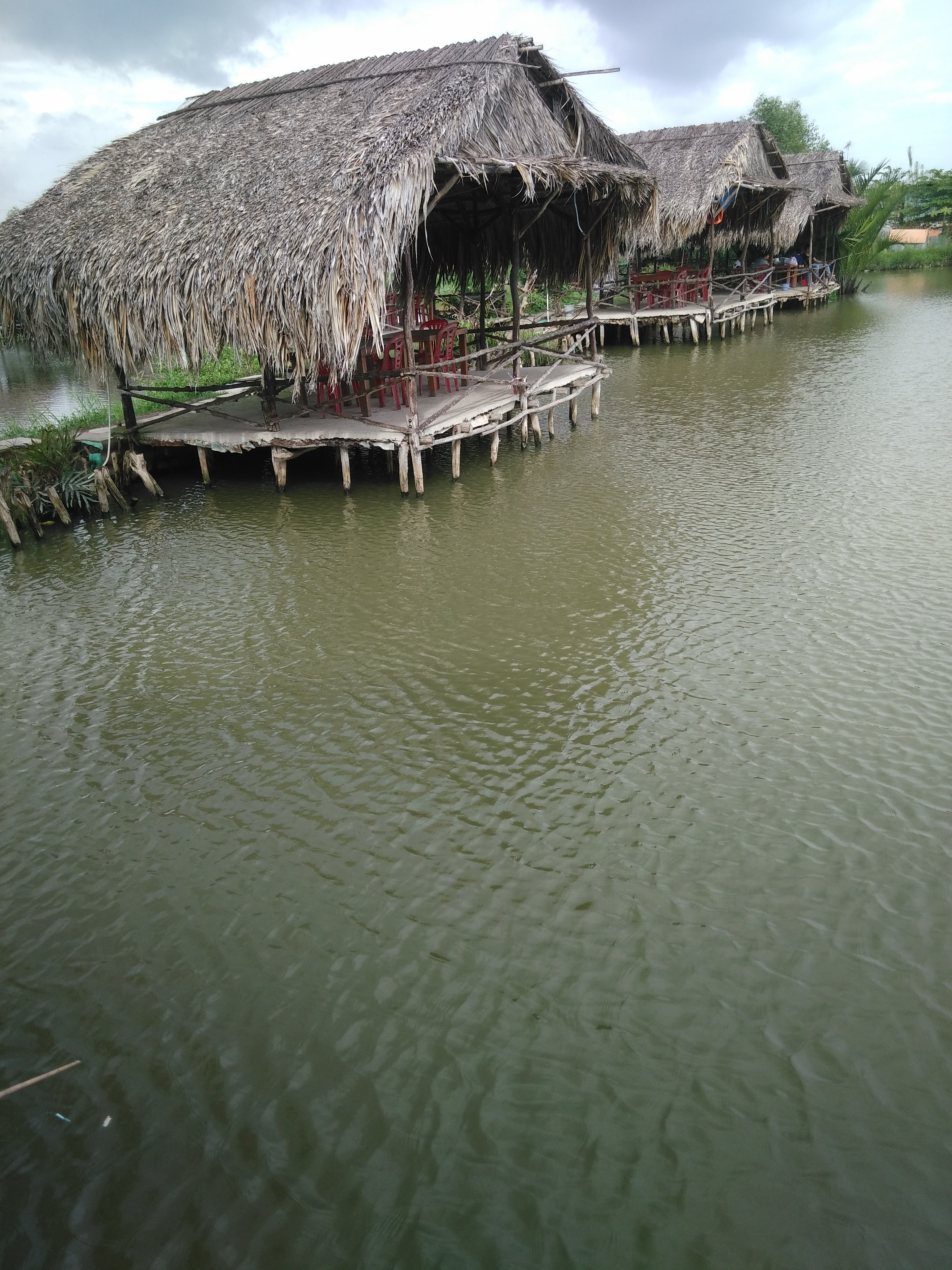 Hình tự chụp bằng di động cá nhân về Khu câu cá giải trí Phương Nam, địa chỉ A18/553C ấp 1, xã Phong Phú, huyên Bình Chánh